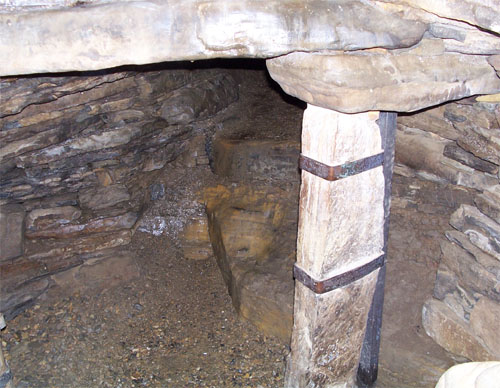 Rennibister Earth House, Mainland (Orkney)